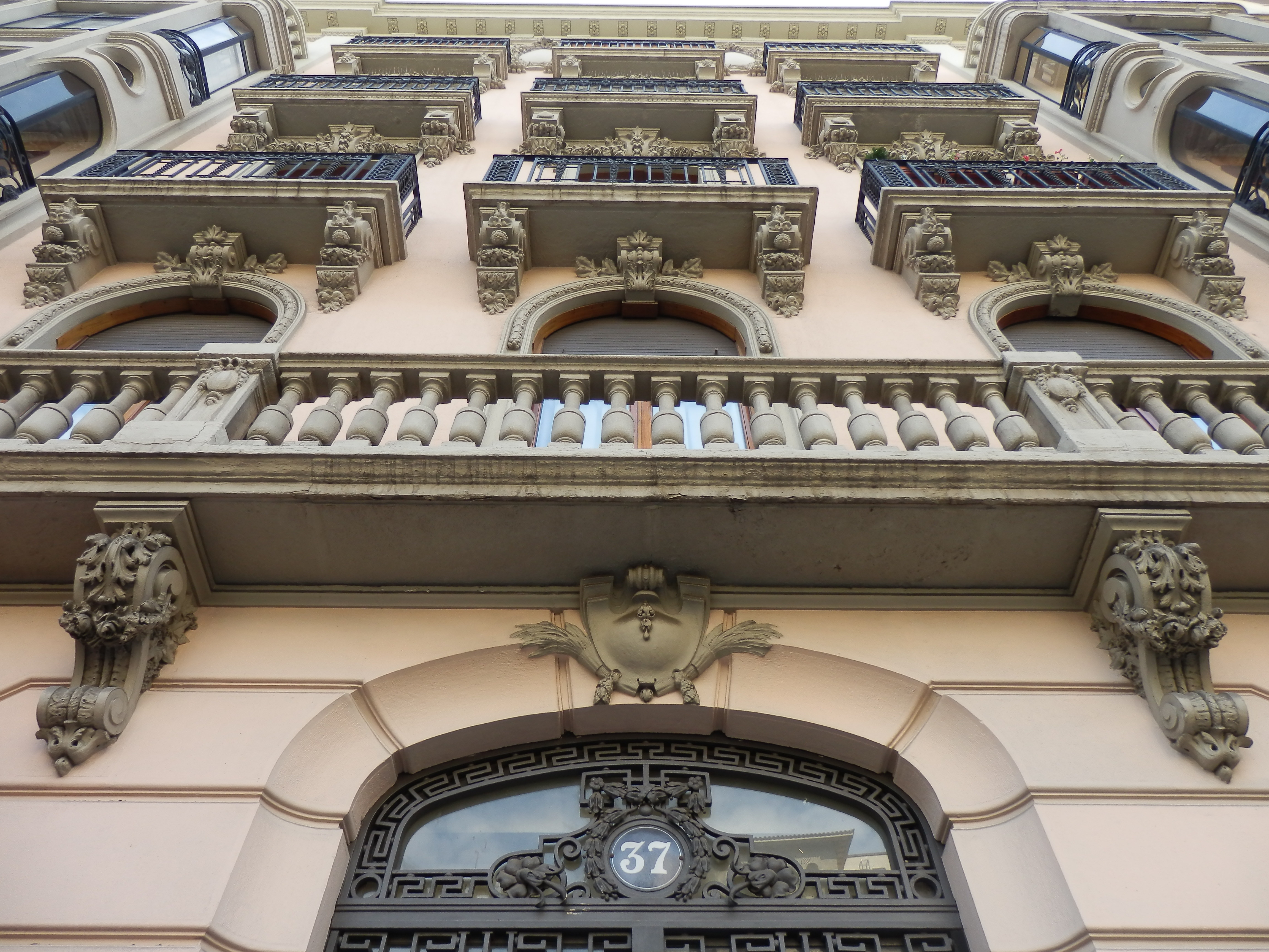 Edificio de viviendas en el Paseo de Sagasta, 37, de Zaragoza, España. Es bien de interés cultural (BIC) de la provincia de Zaragoza.